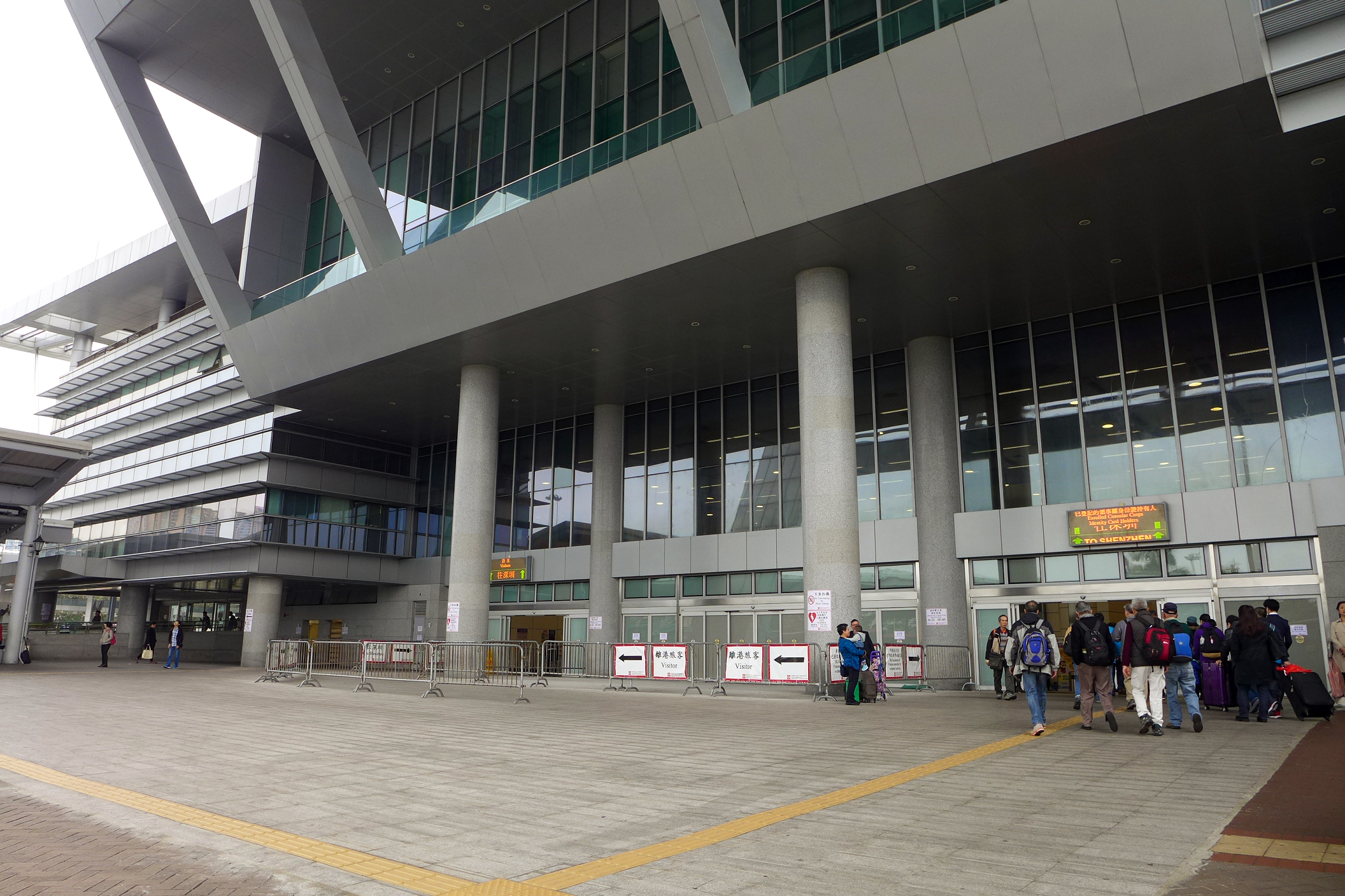 Shenzhen Bay Port